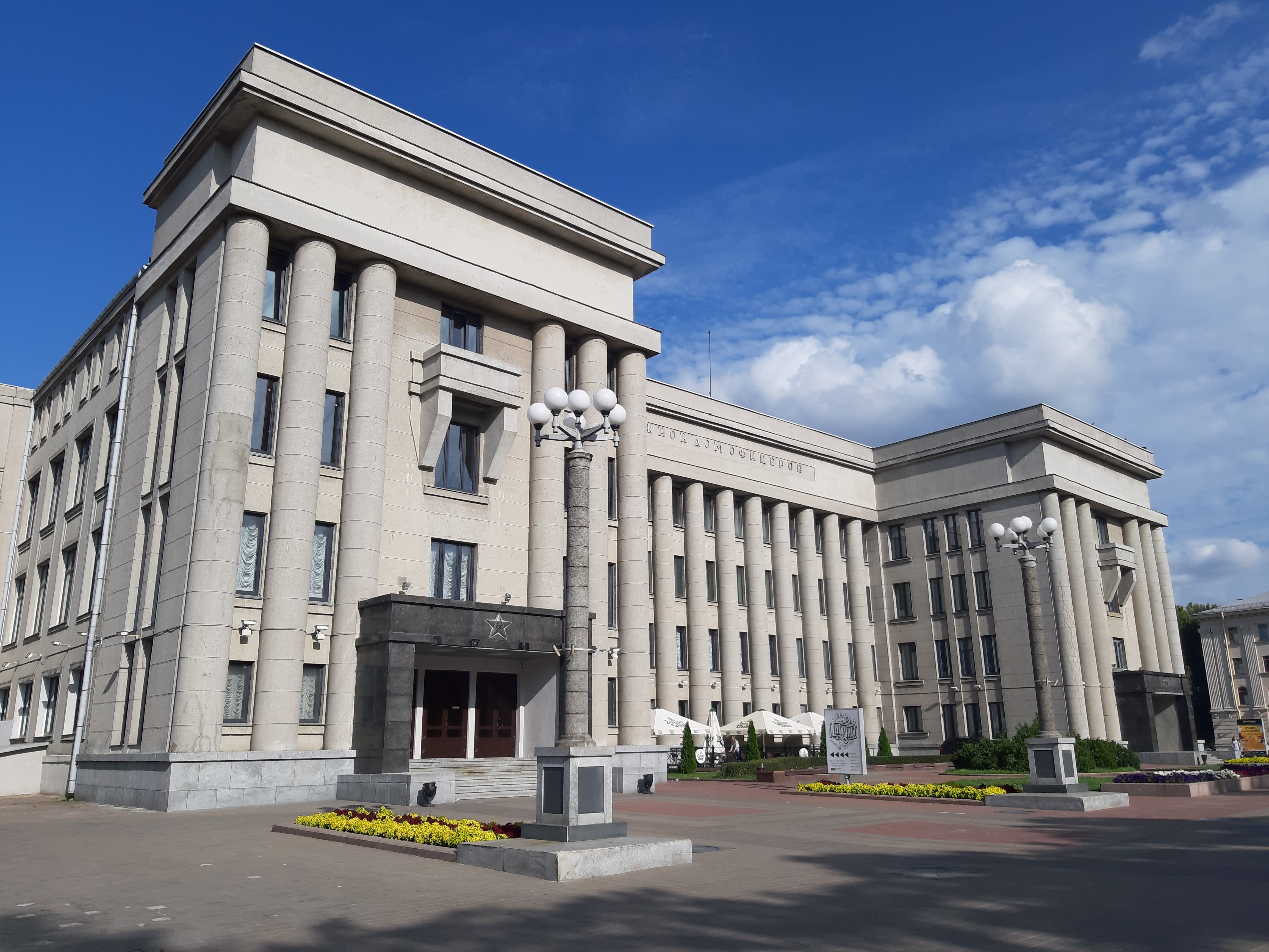 Мінск. Па Чырвонаармейскай